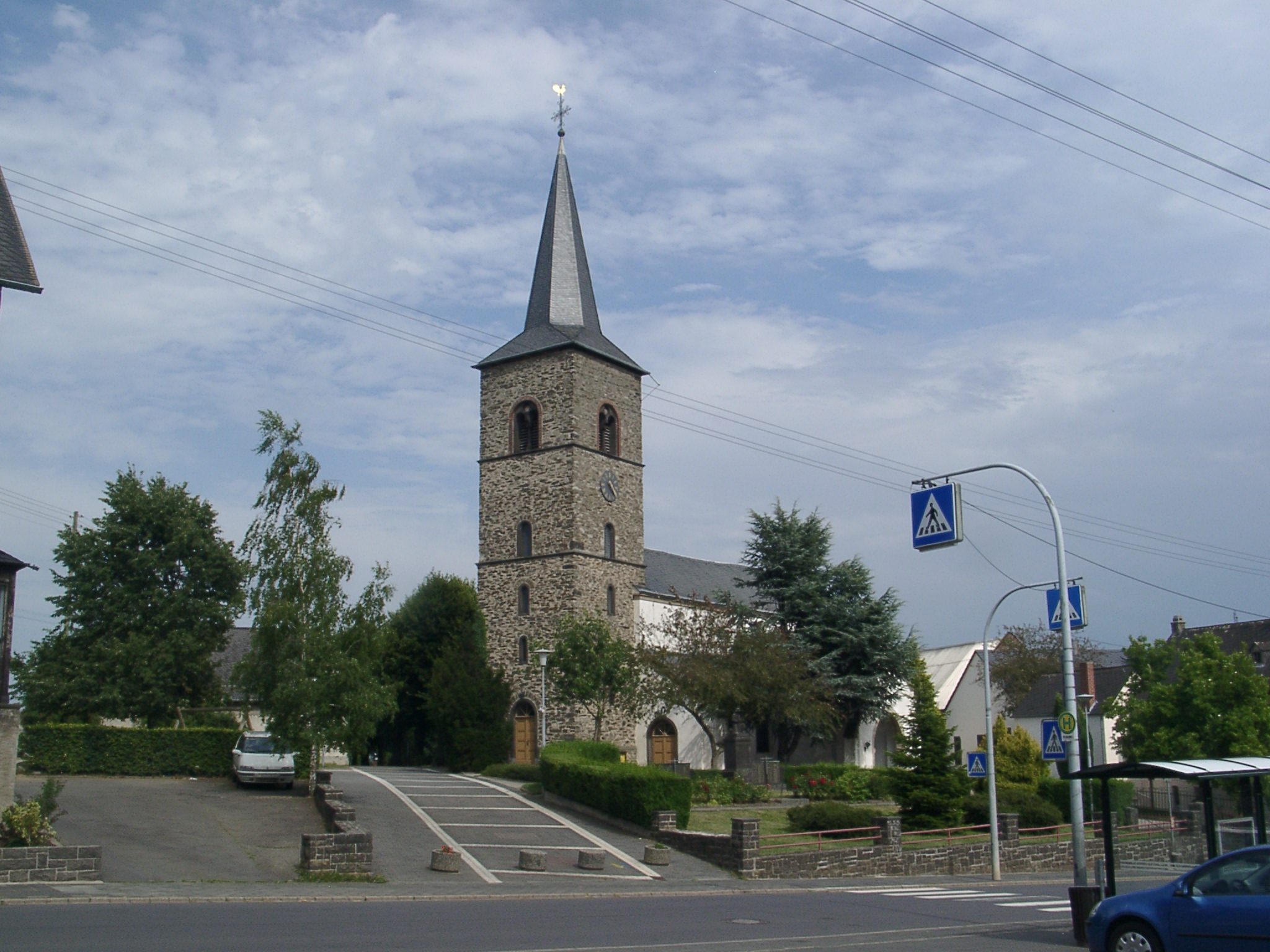 Kirche in Mertloch (MYK) - selbst fotografiert (Klaus Graf) 28.7.2005